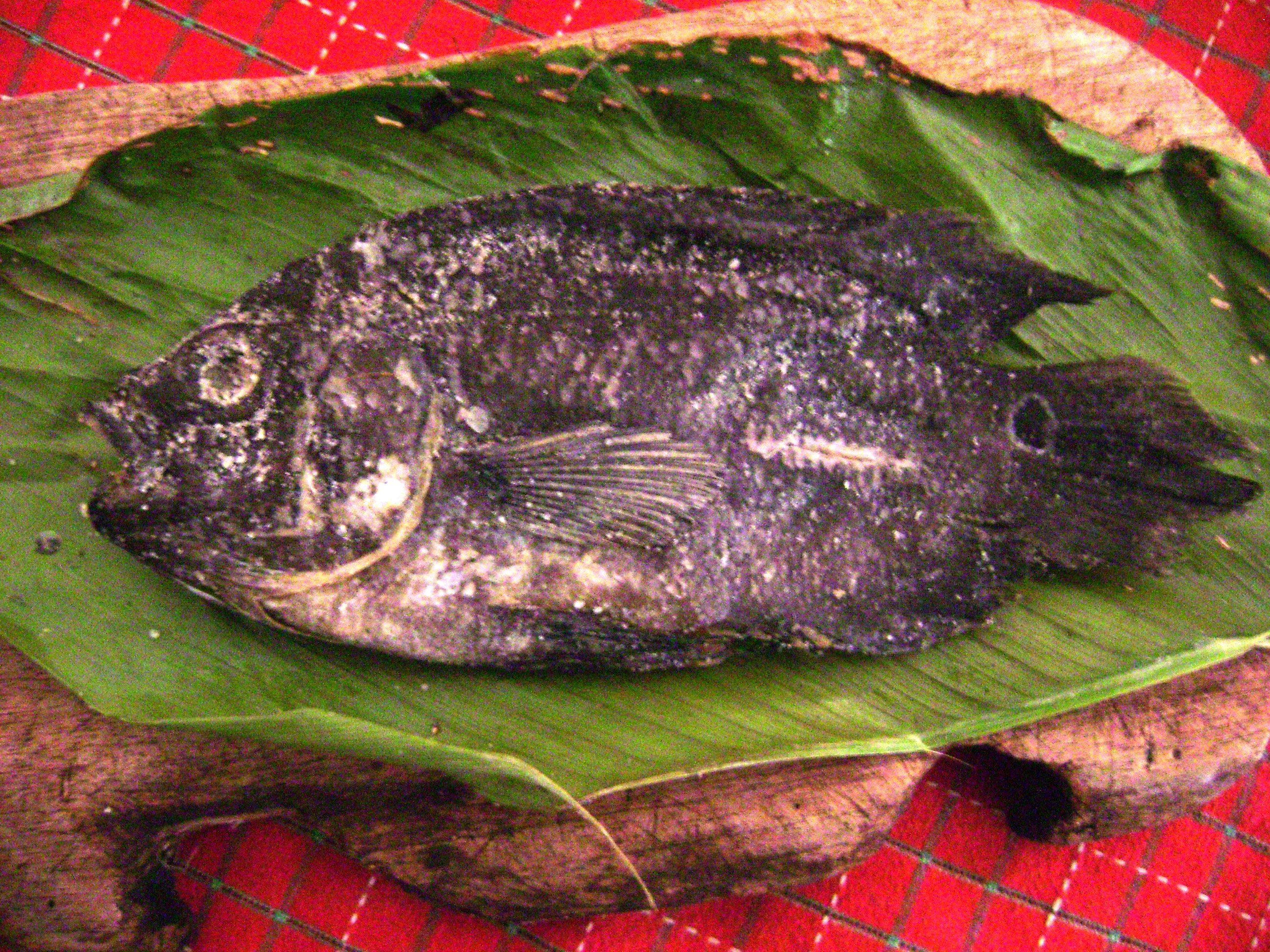 Un pescado conocido como Acarahuazu. Iquitos-Perú.